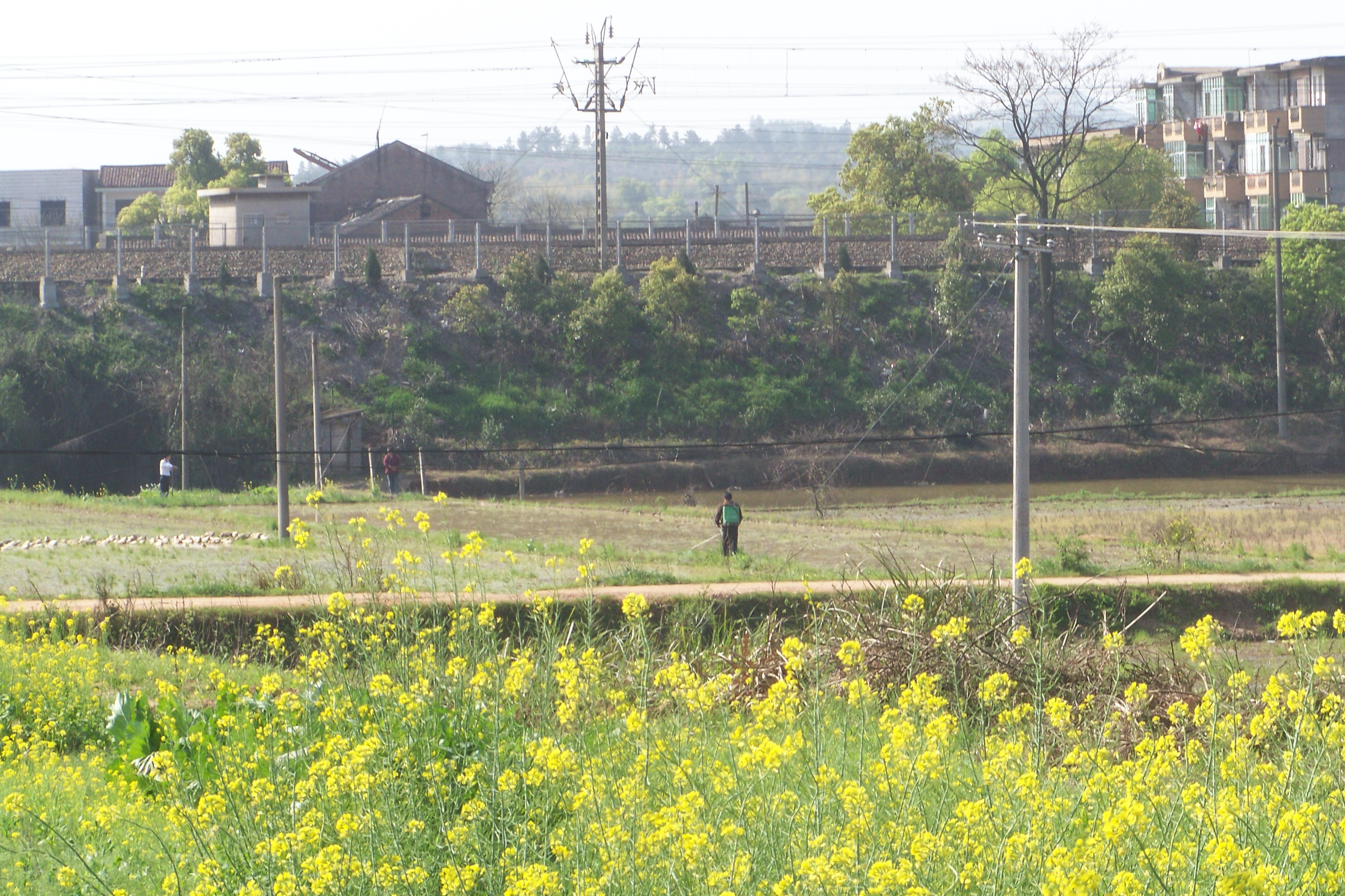 农活